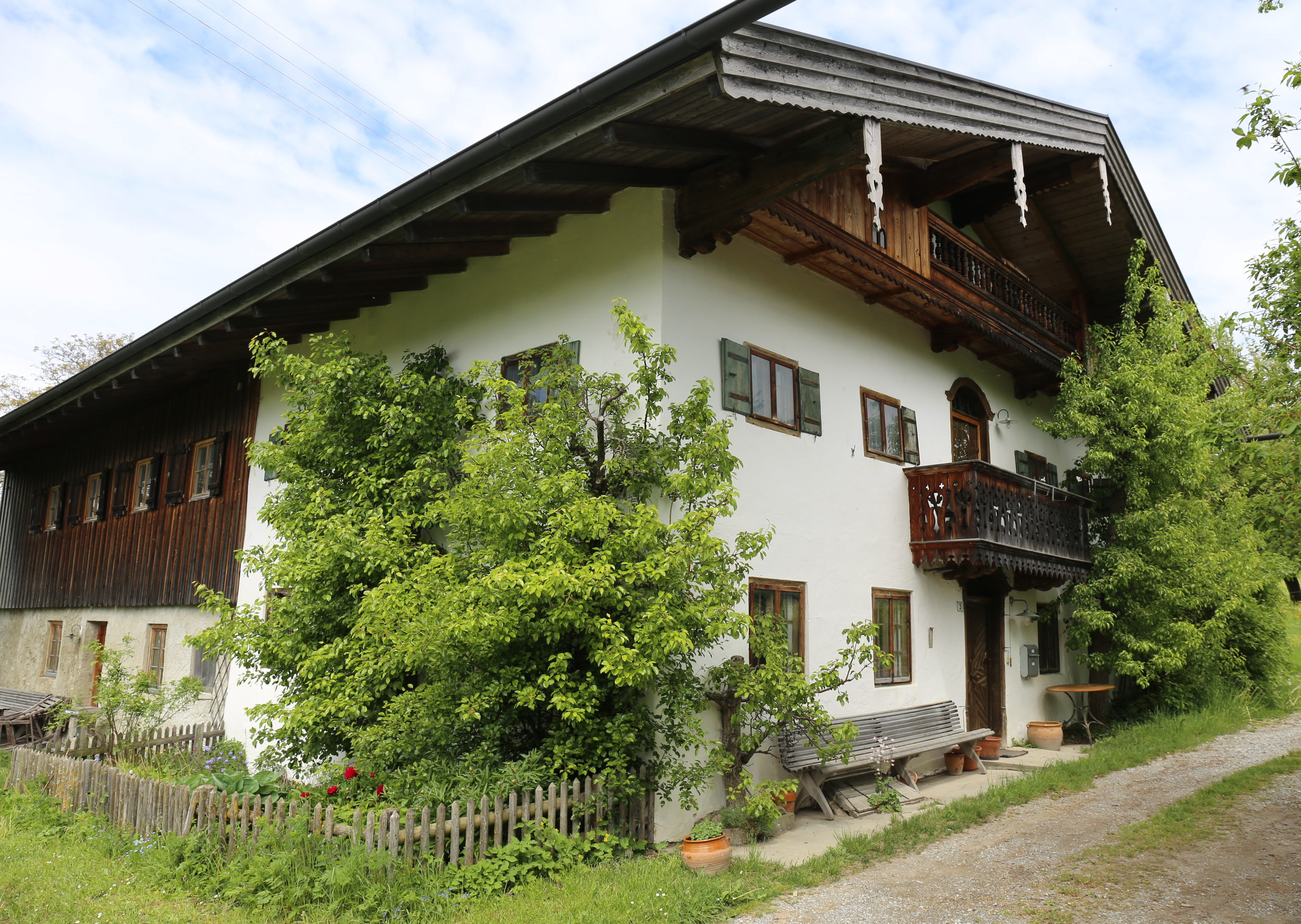 Oberleiten 3, Samerberg; Kleinbauernhaus mit Hochlaube und zwei geschnitzten Türen, bezeichnet 1781